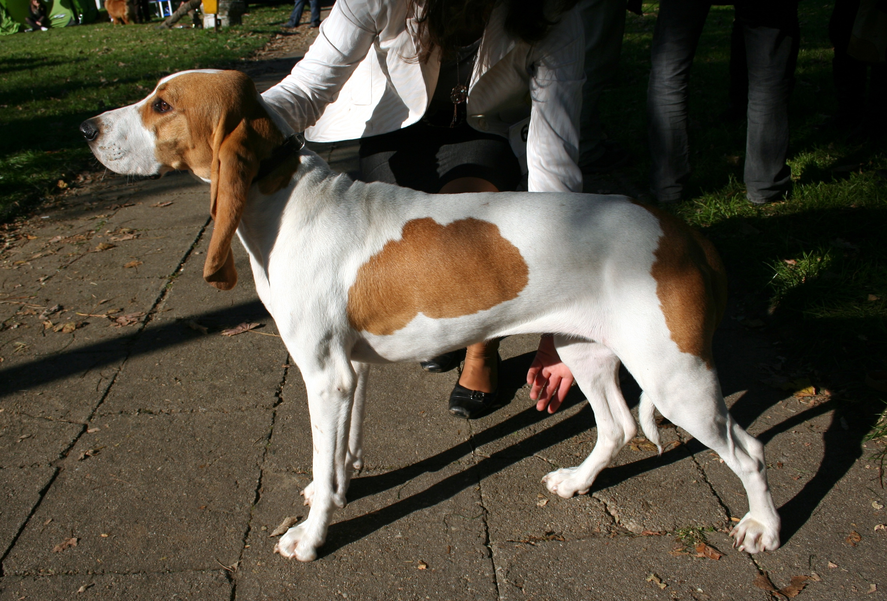 XXXVIII Wystawa krajowa psów rasowych w Częstochowie. Gończy ze Schwyz: Ella Haniccina Zahradka z hodowli Z Pastorowej Sfory należąca do Mariusza i Wioletty Antoszczuk.